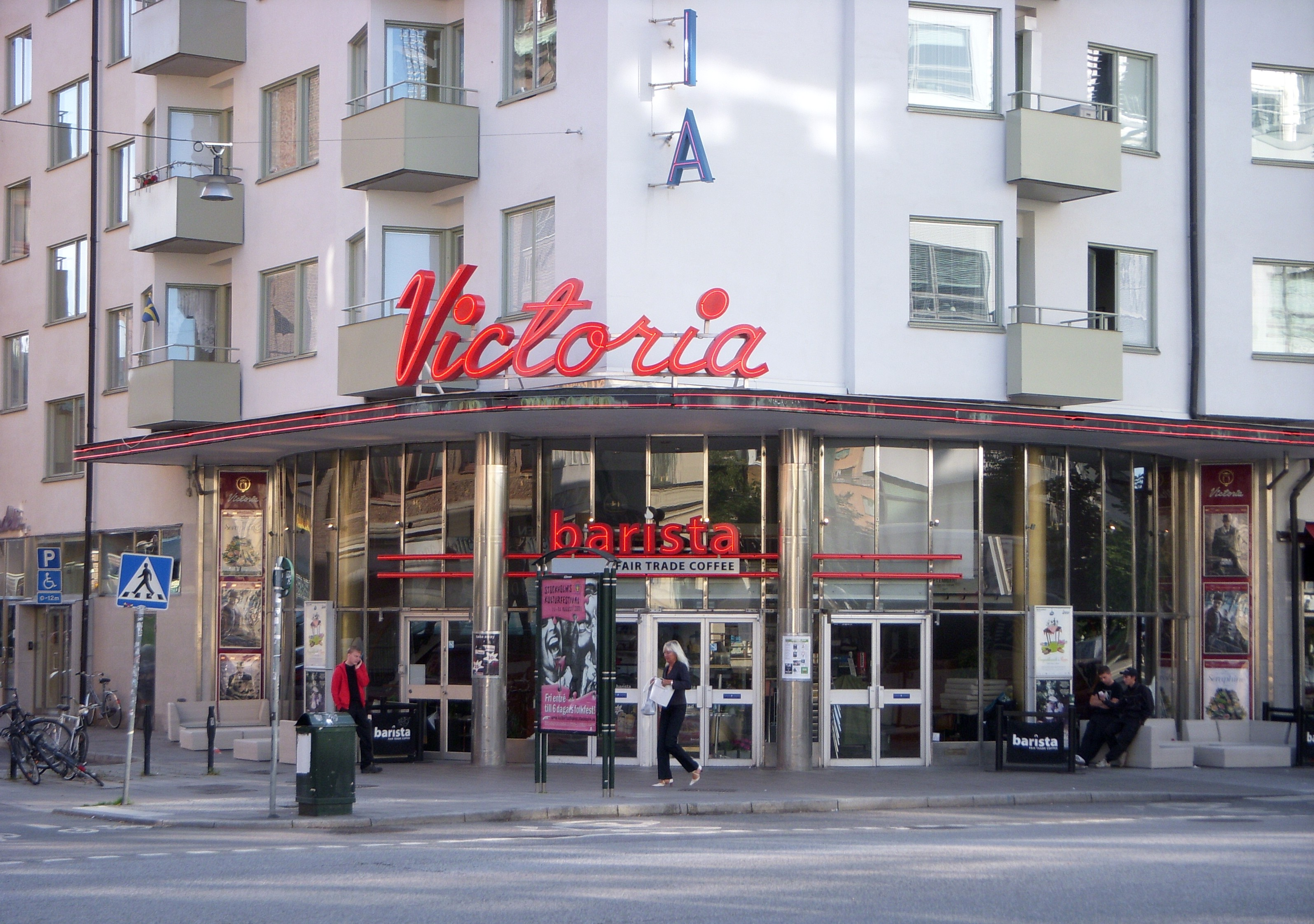 Biograf Victoria på Södermalm i Stockholm